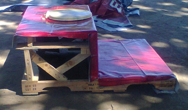 ArborLoo de palets para sentado, con asiento normal de plástico